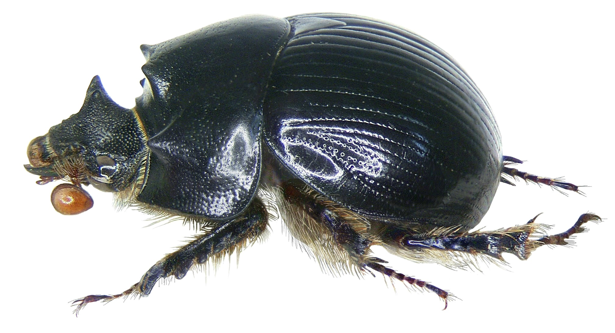 Familie: Scarabaeidae Grösse: 10-15 mm Verbreitung: Nordafrika, Spanien Fundort: Espana leg. H.Hechelmann; det. U.Schmidt Foto: U.Schmidt, 2007